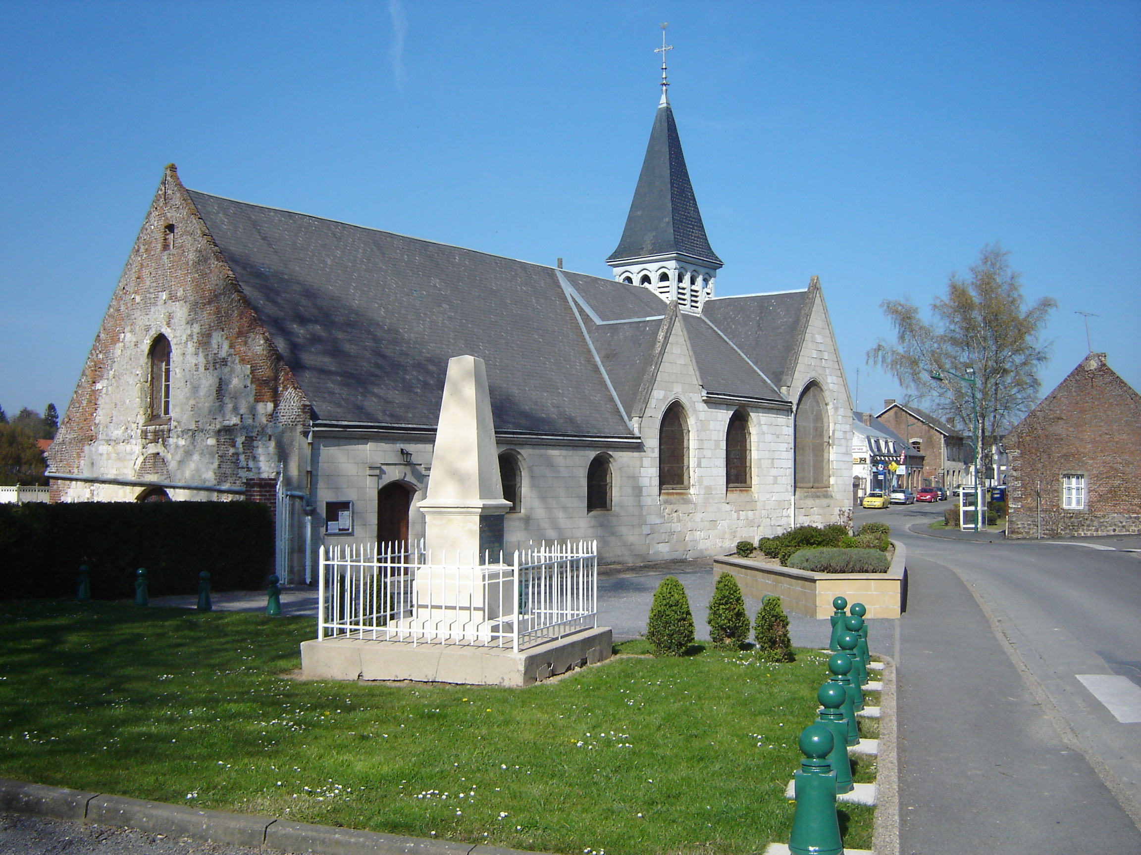 De kerk van Homblieres 2007 door hullie22